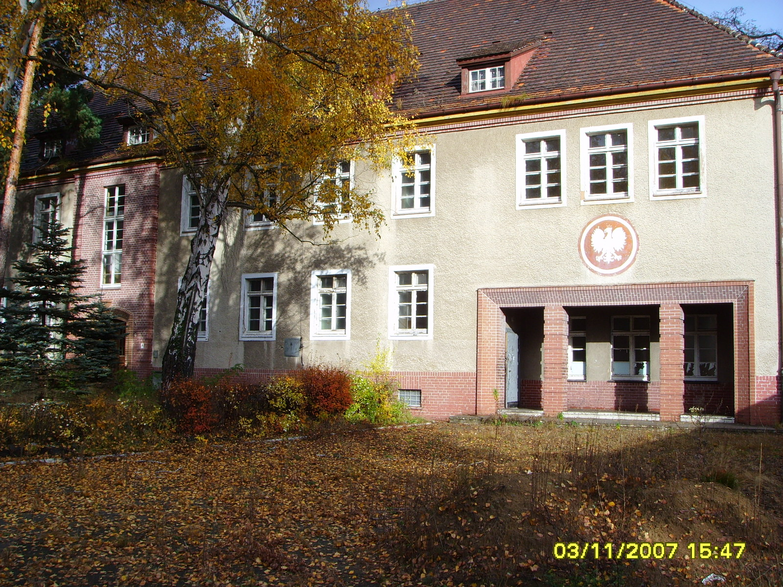 Budynek sztabu 27 pułku czołgów z Gubina, w latach 90.XX w budynek sztabu 2 a po przemianowaniu 5 batalionu rozpoznawczego. "Pod orłem" znajdował się areszt wojskowy wraz z wartownią. (10 lat po rozwiązaniu jednostek)